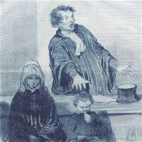 Ceci est un scan d'une litho de Daumier. Celui-ci est mort en 1879, son œuvre est dans le domaine public.villy 11 avr 2004 à 09:14 (CEST)